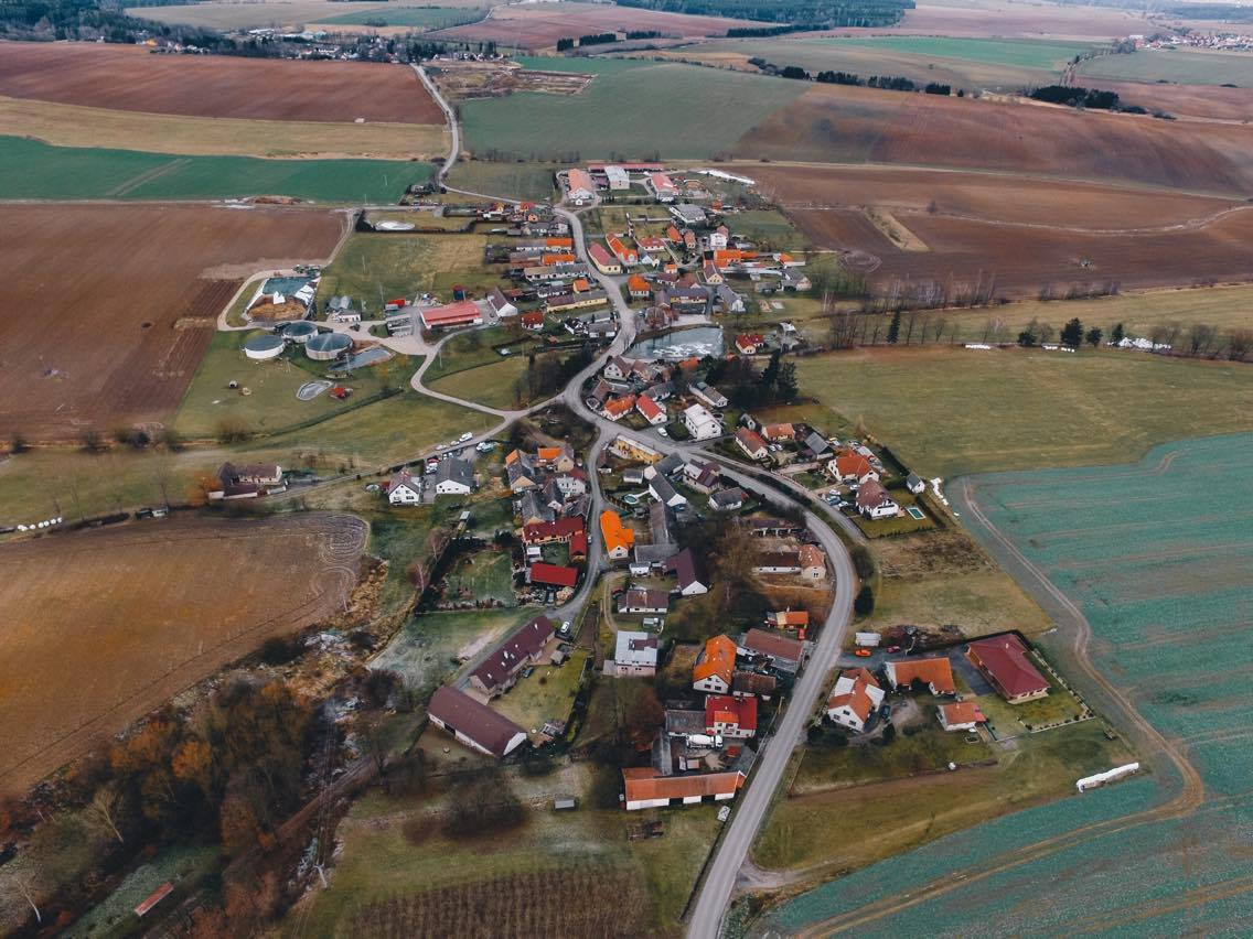 Obora (Malšice) Letecký pohled z jižní strany (od obce Želeč)